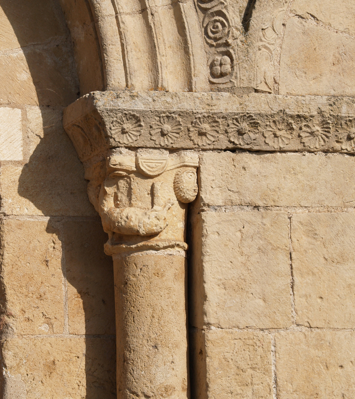 Détail du décor sculpté de la façade du prieuré de Drevant (Cher)